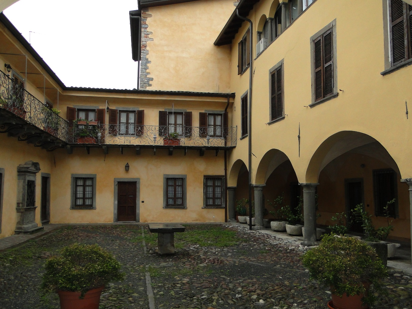 Loggiato via Albertoni. Vertova (BG). Italia